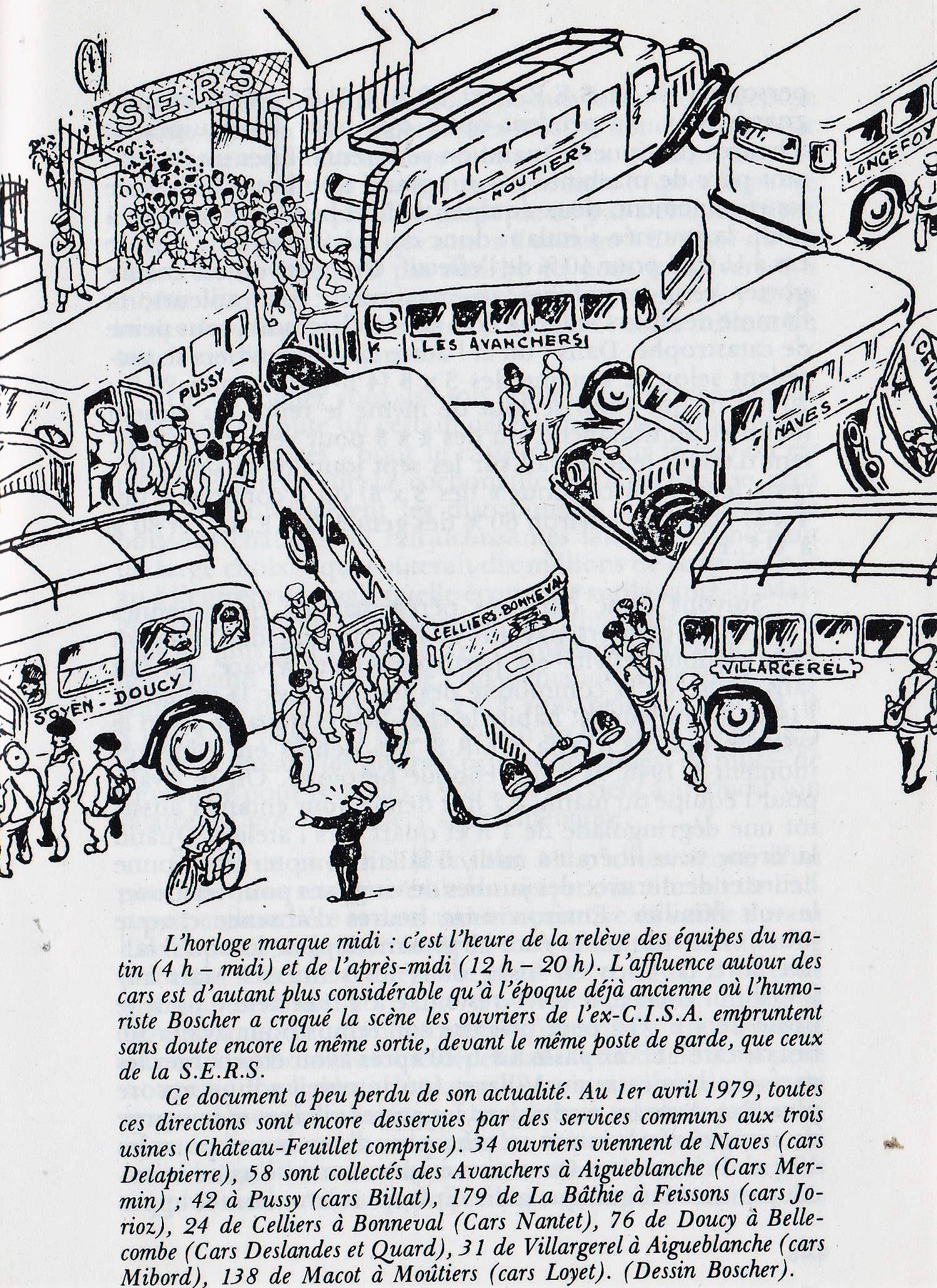 Celliers migrations d'ouvriers-paysans